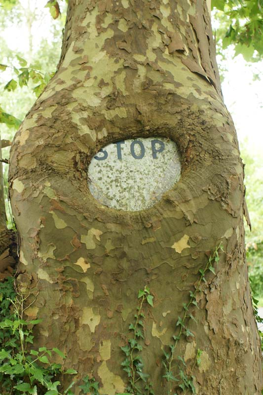 Ce panneau cloué avant 1971 sur un jeune platane s'est inclus grâce à l'activité cambiale. La Genevraye, Seine et Marne L'inclusion sera totale vers 2025